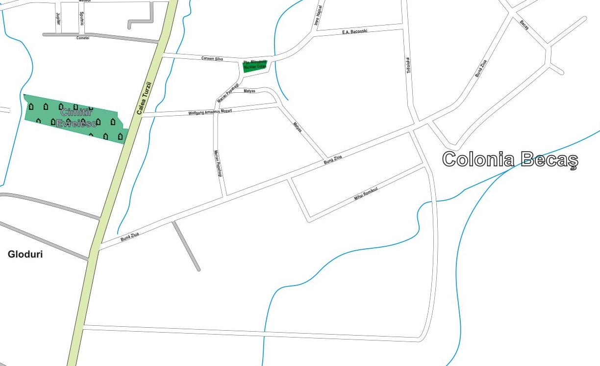 Harta Zonei Buna Ziua, Colonia Becas, Cluj-Napoca